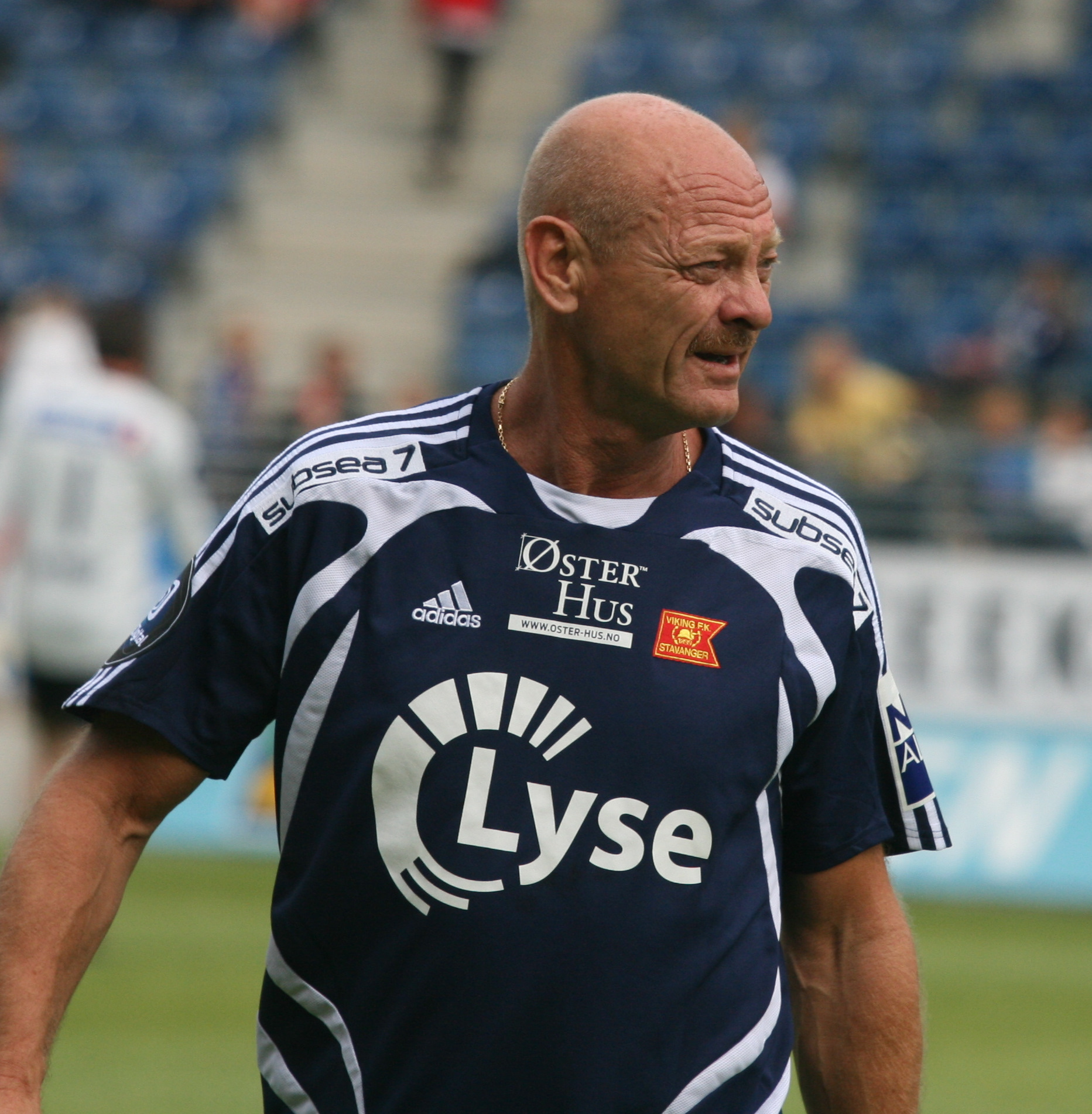 Per Henriksen